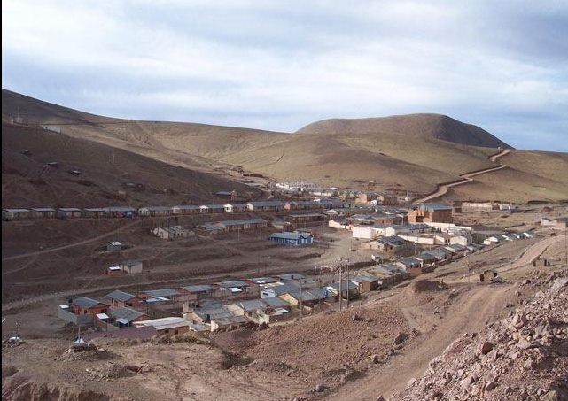 Centro Minero